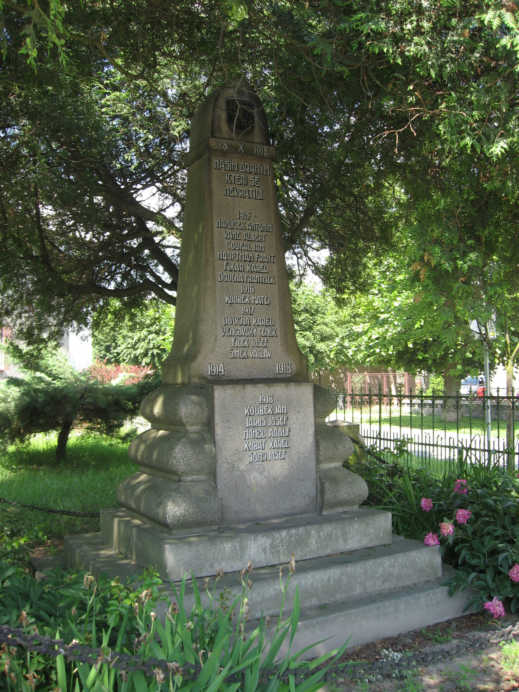 Lípa, okres Havlíčkův Brod - památník obětem 1. světové války